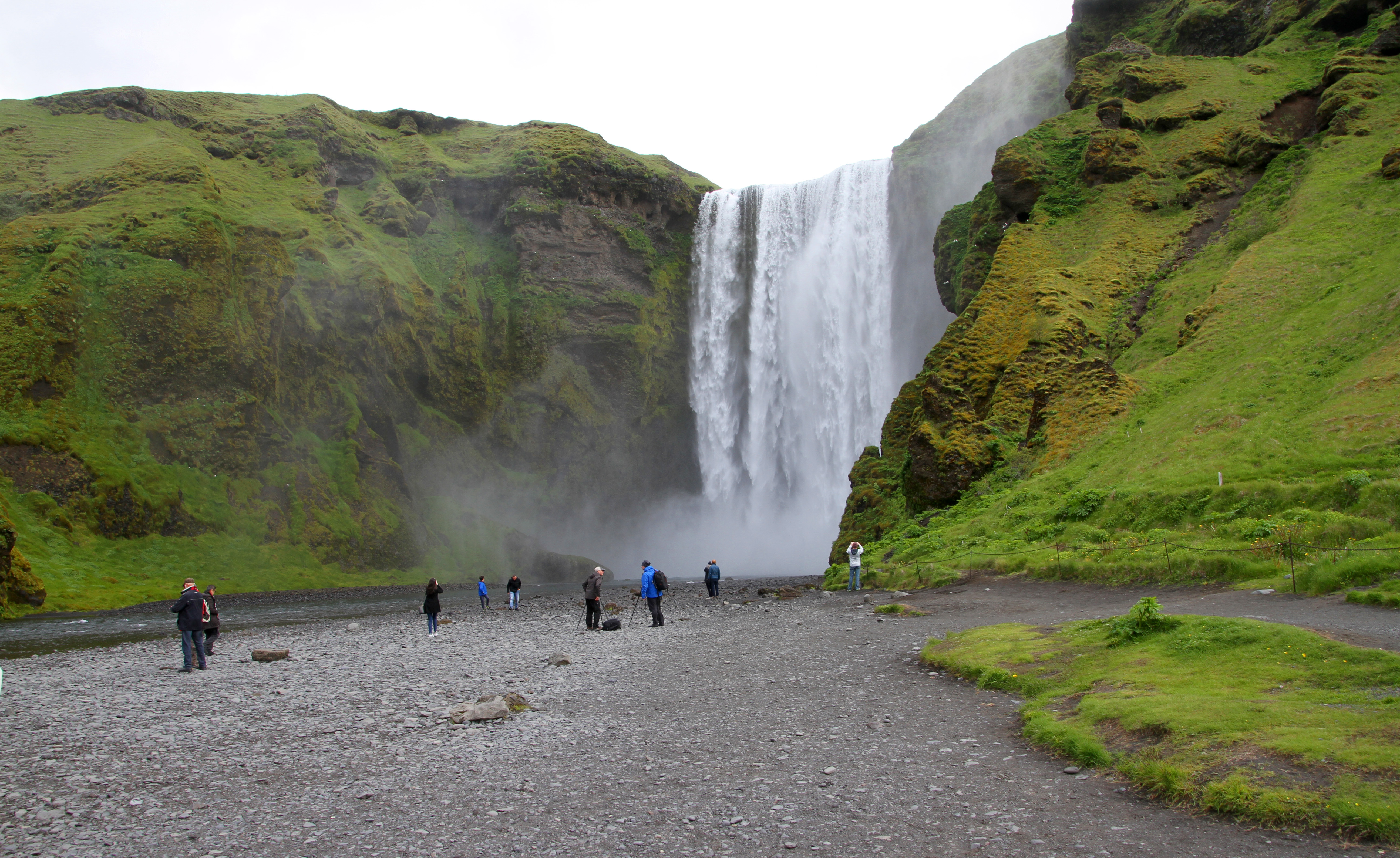 Skógafoss